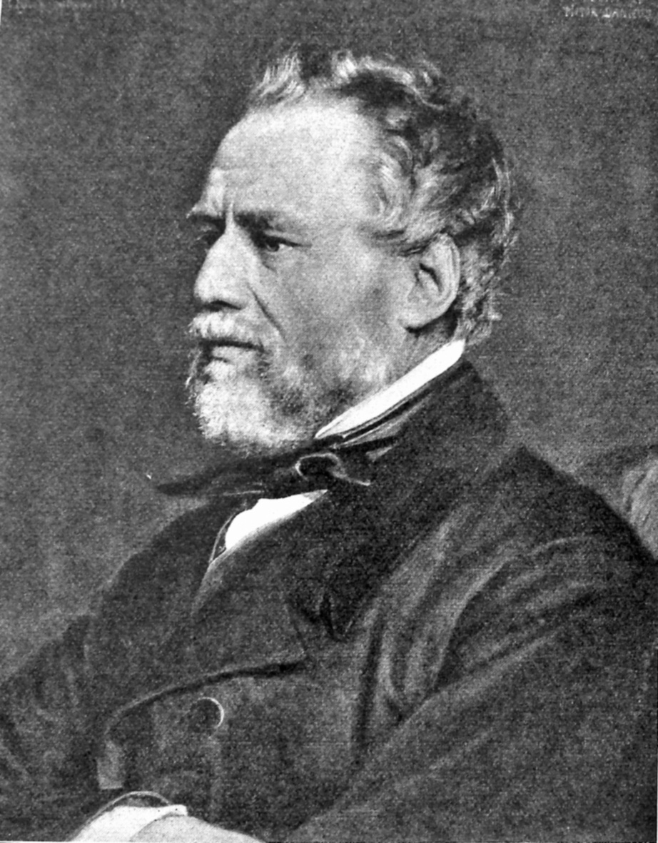 Wilhelm Nikolaj Marstrand (Nicolai Wilhelm Marstrand, 24. december 1810 - 25. marts 1873) var en dansk maler.